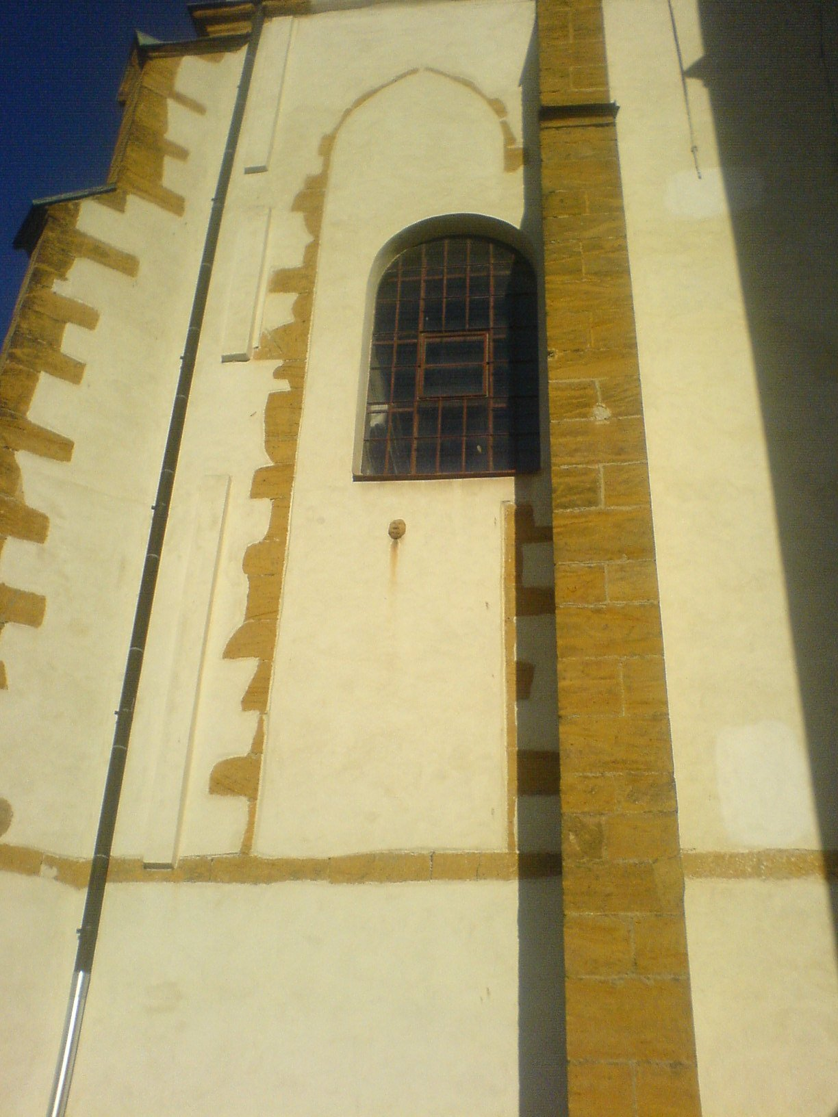 kostel sv. Prokopa Letovice